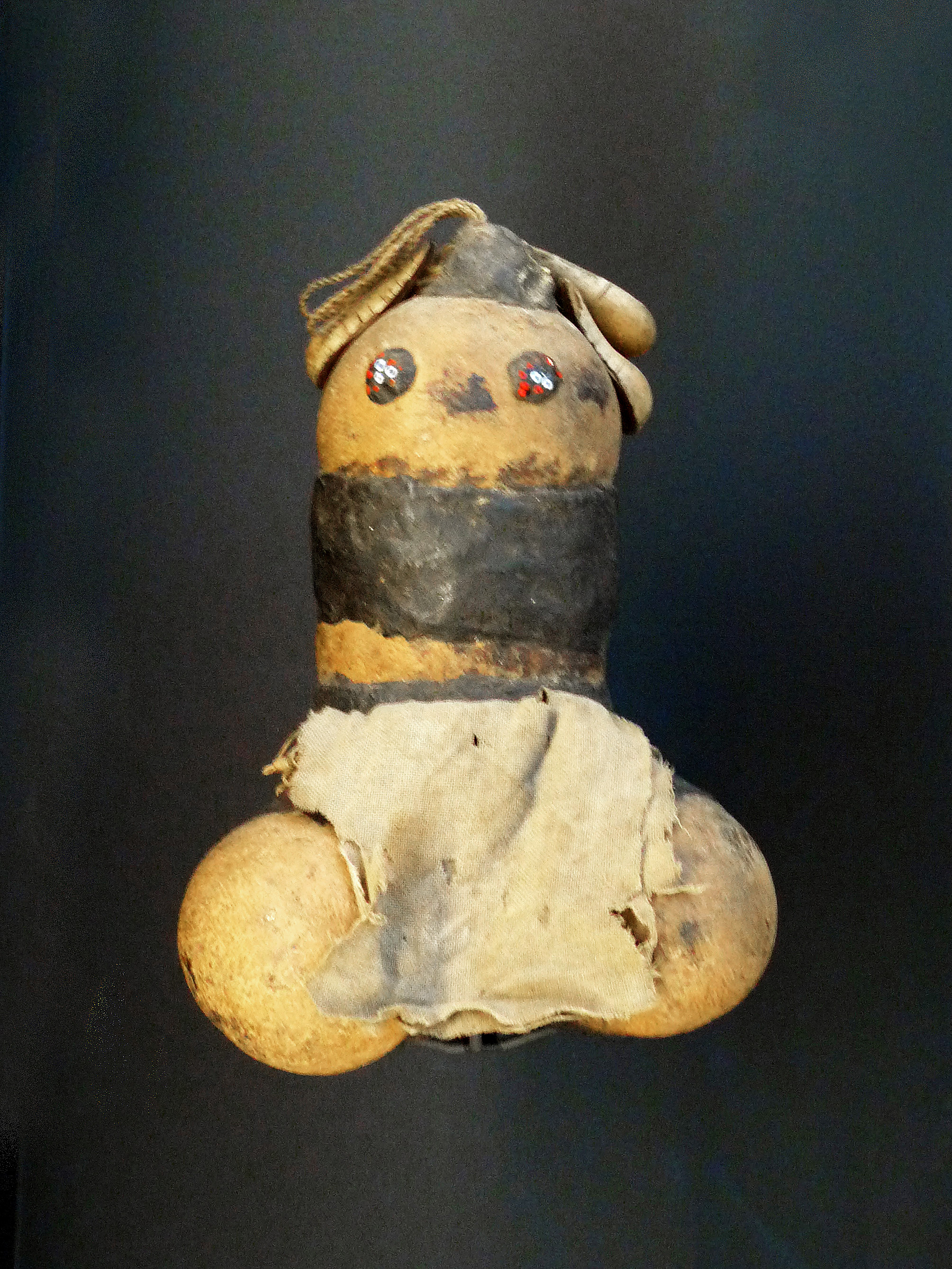 Poupée (moina), population Nsenga, Mozambique, Chemba, province de Sofala. Formée de plusieurs fruits réunis par de la résine, étoffe, perles. Portée dans le dos par les petites filles. Musée du quai Branly.